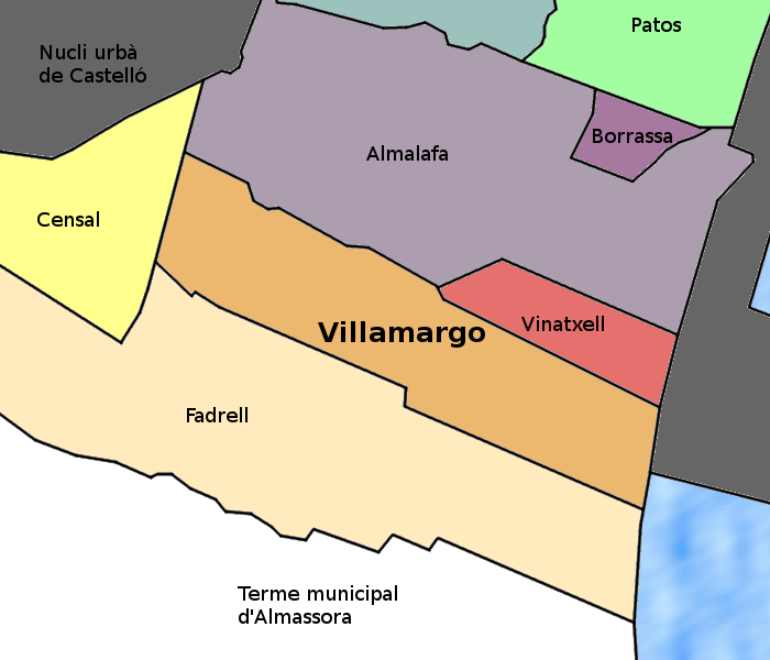 Cròquis de la situació de la Partida de Villamargo al Terme Municipal de Castelló de La Plana.